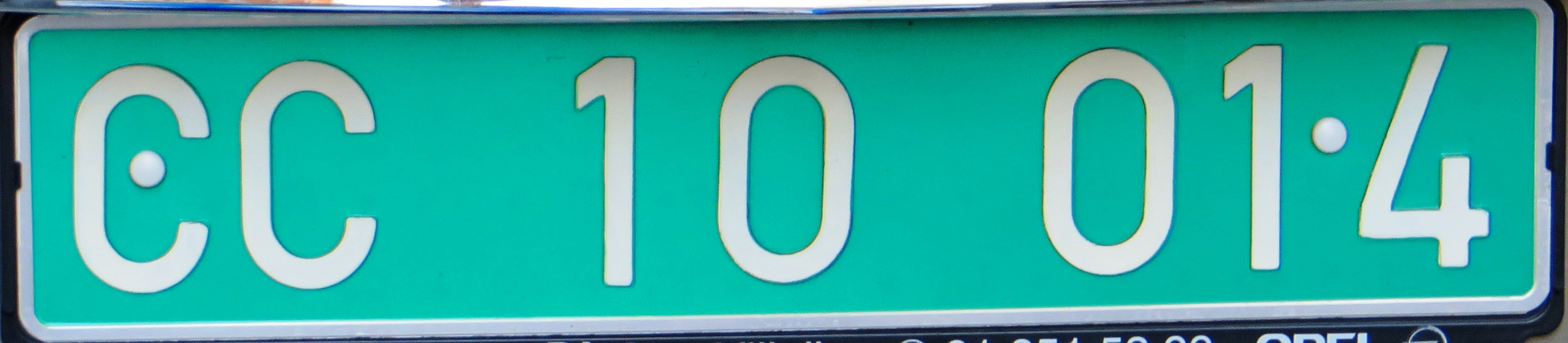 Consulaire kentekenplaat Spanje